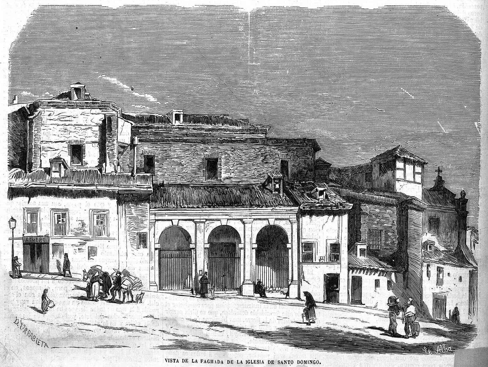 «Vista de la fachada de la iglesia de Santo Domingo», en la revista española El Museo Universal.